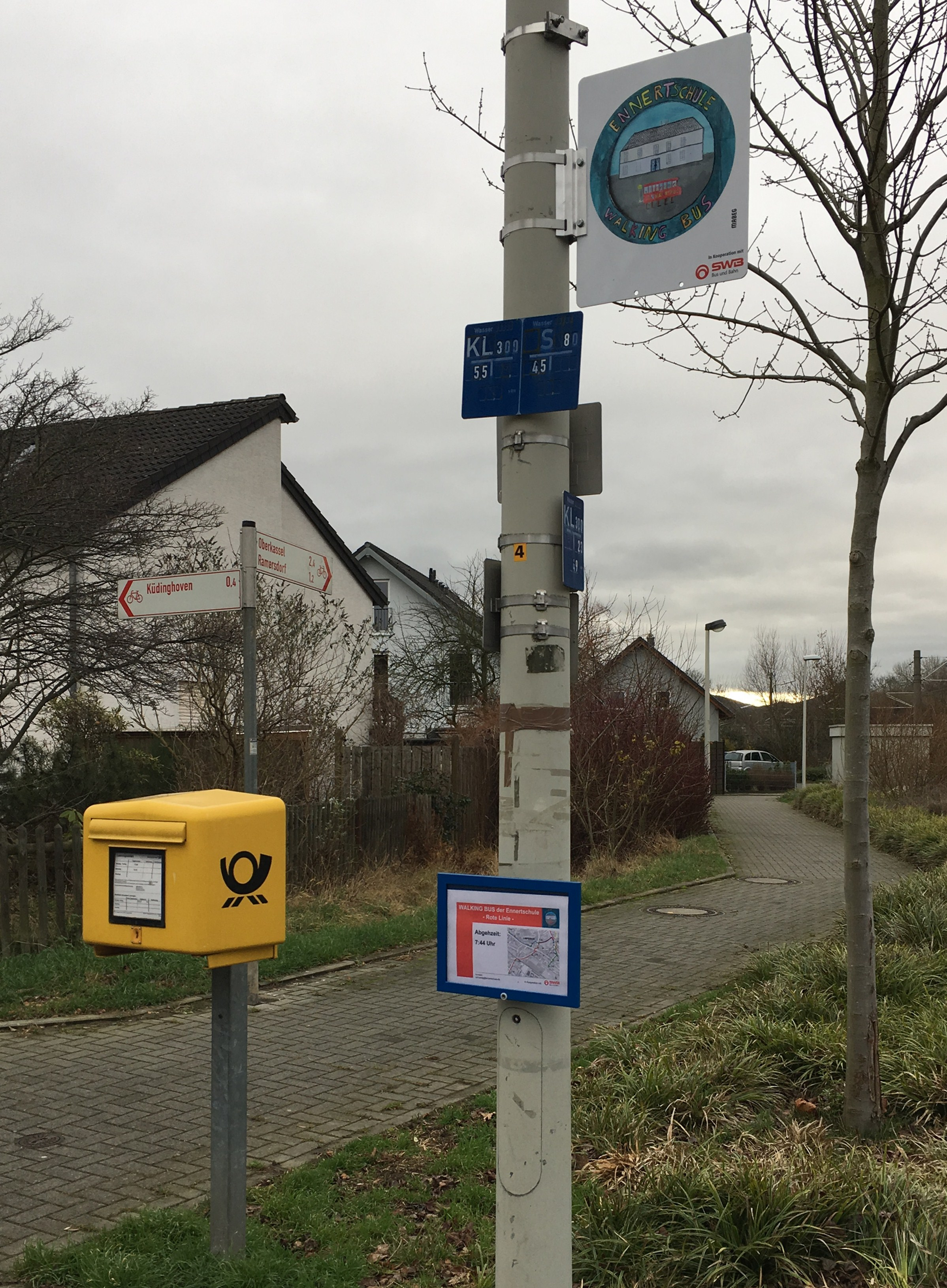 Deutschland, Bonn-Beuel, Küdinghoven: Haltestellenschild und Streckenplan einer von mehreren Linien des "Walking Bus" der Ennertschule.